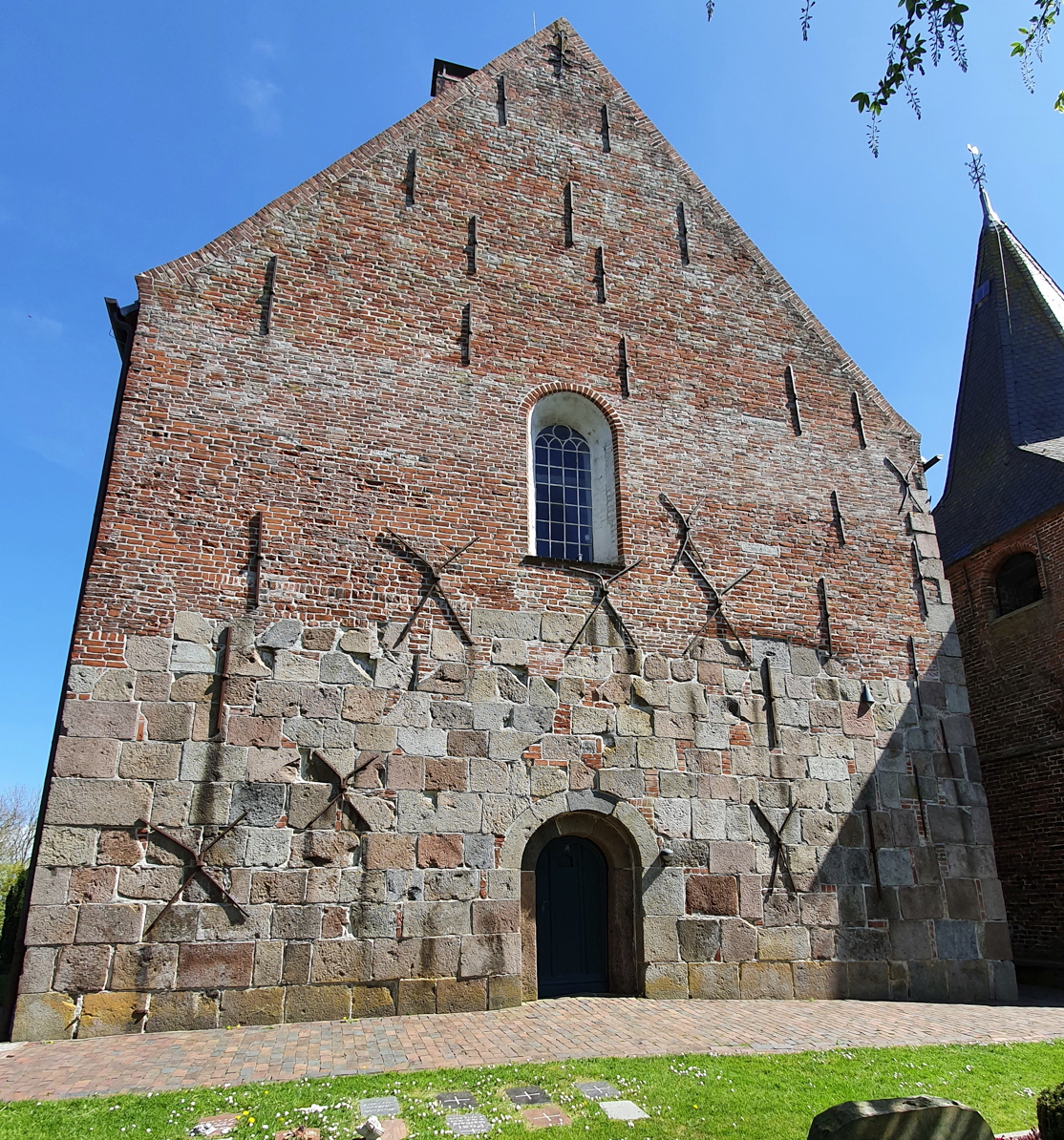 Westgiebel der Dorfkiche Tettens